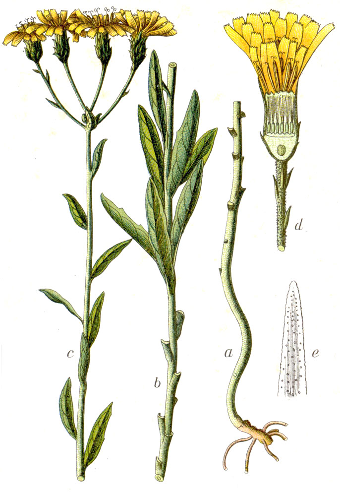 Hieracium umbellatum L. Original Caption Doldiges Habichtskraut, Hieracium umbellatum